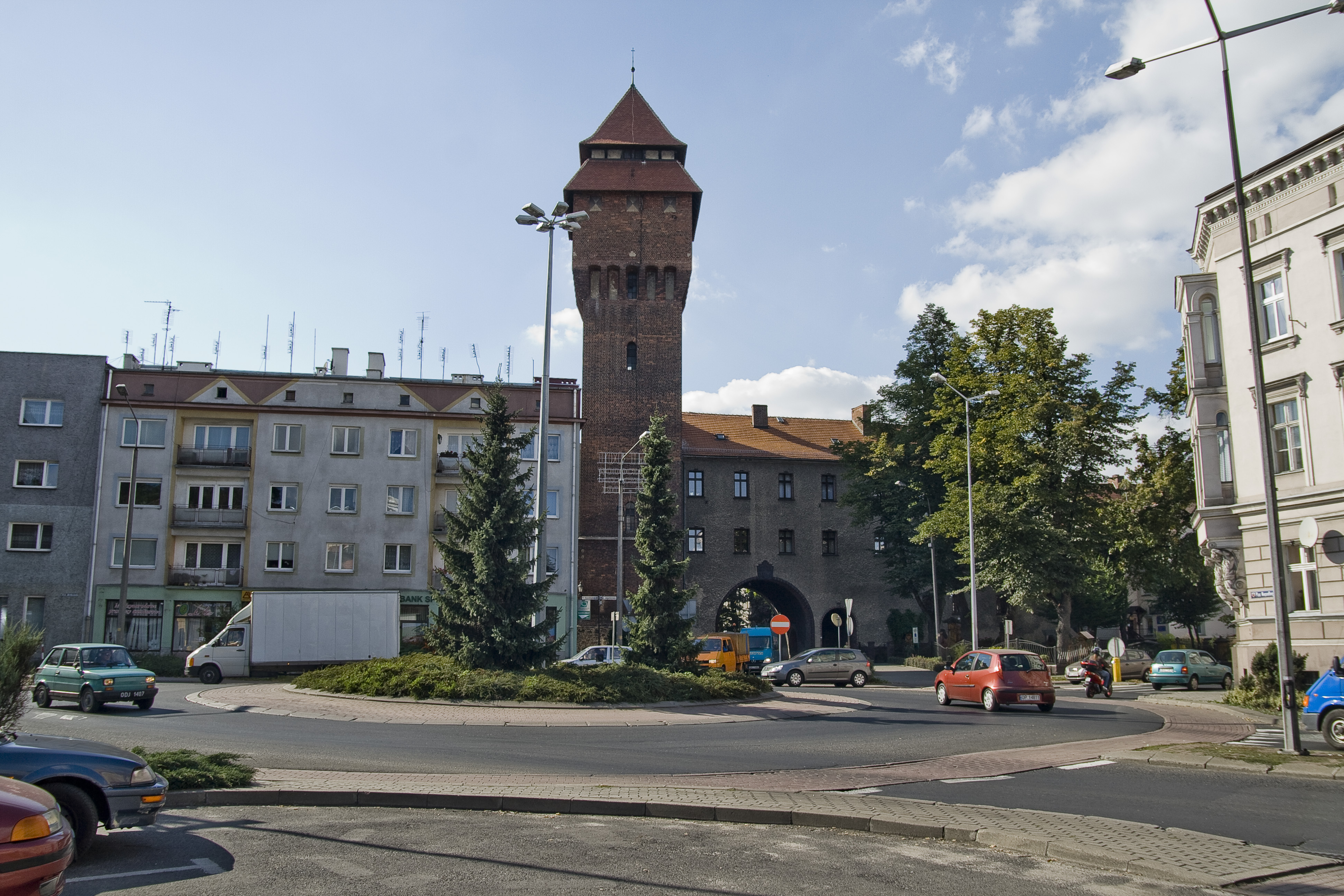 Wasserturm von Kluczbork mit anliegendem Kreisverkehr